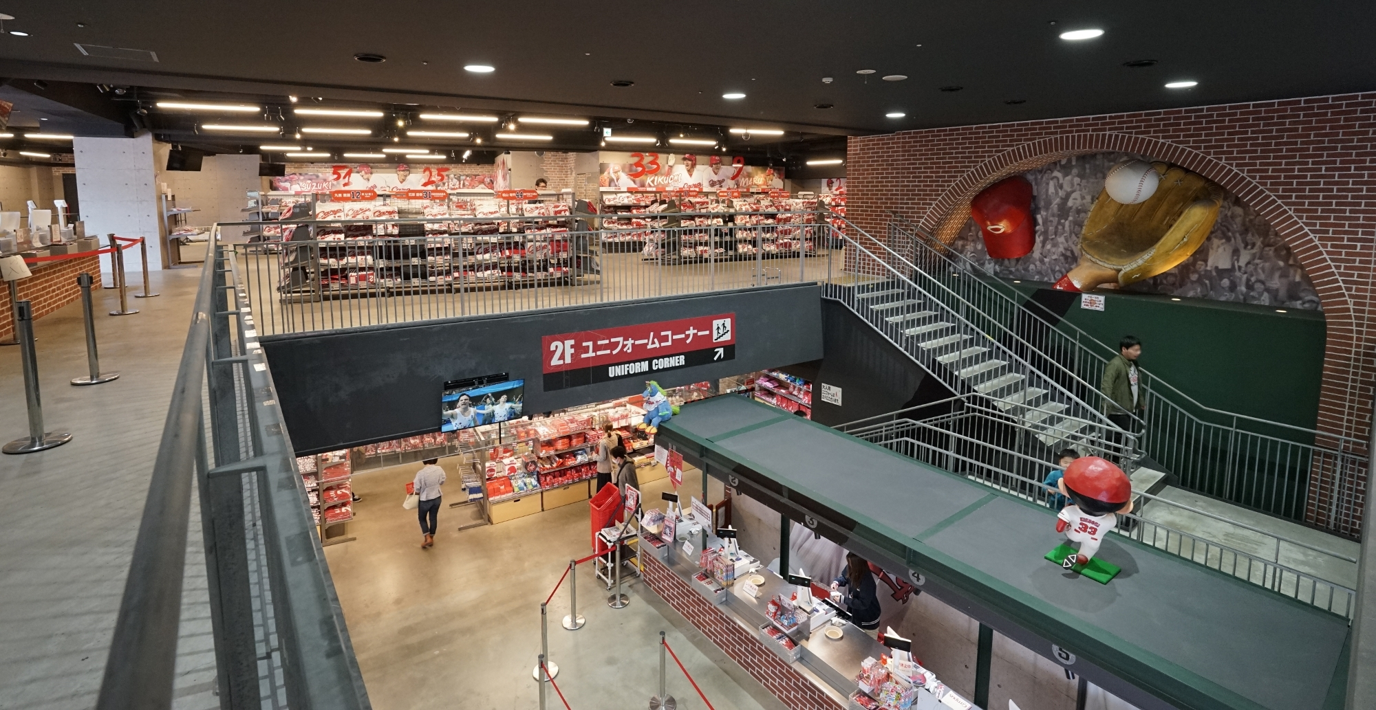 2009年4月12日、広島市民球場（マツダスタジアム）グッズショップ内にて本人撮影 2009年4月12日 (日) 21:43 . . HKT3012 . . 800×600 (447 キロバイト)